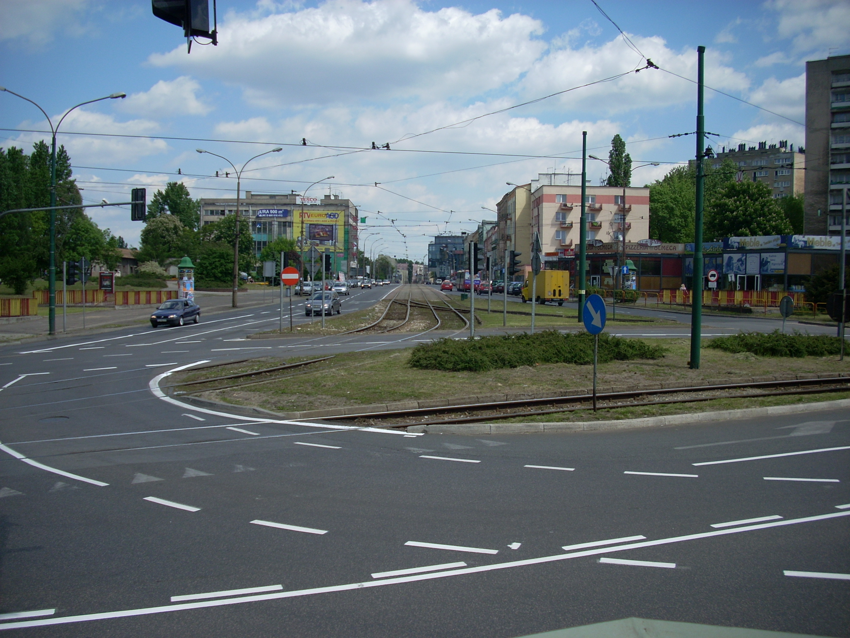 ulica 3 maja w Sosnowcu